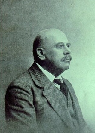 Wenzel Franz Jäger (1861 - 1928), Německočeský malíř, krajinář.